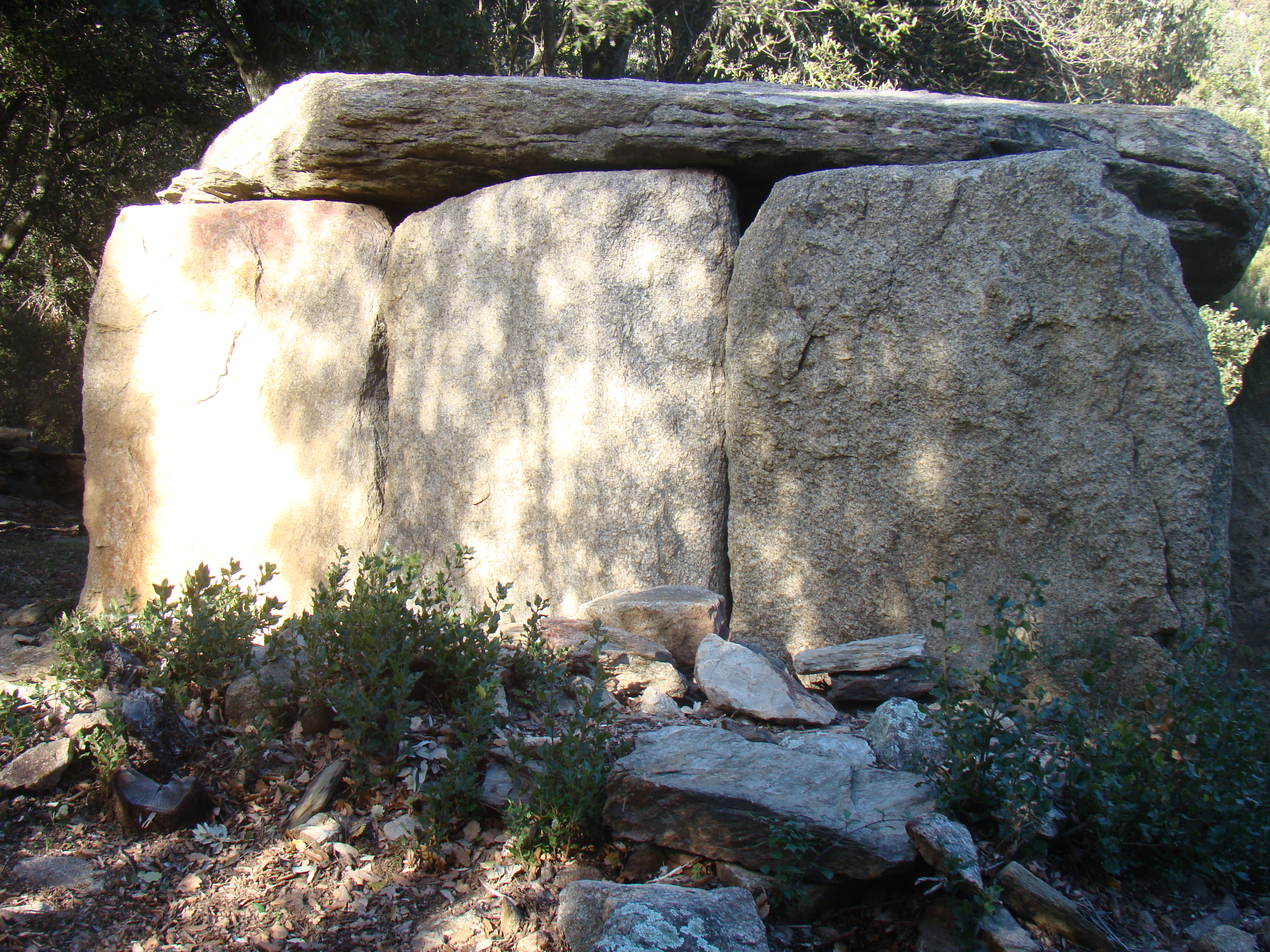 Vue du dolmen de Balma de Na Cristiana de trois quarts gauche